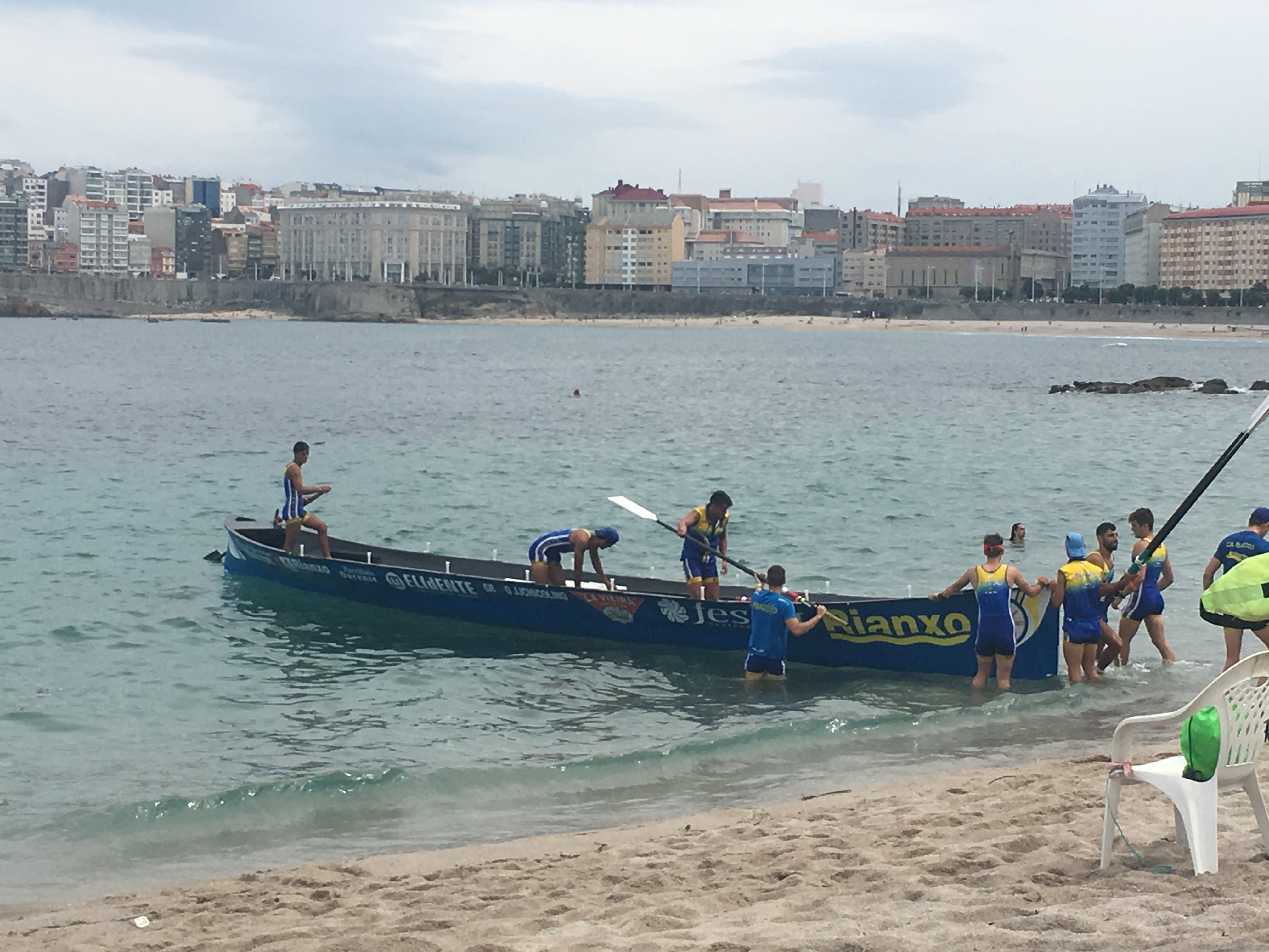 Traiñeira de Rianxo na Bandeira Teresa Herrera da Coruña en 2019.